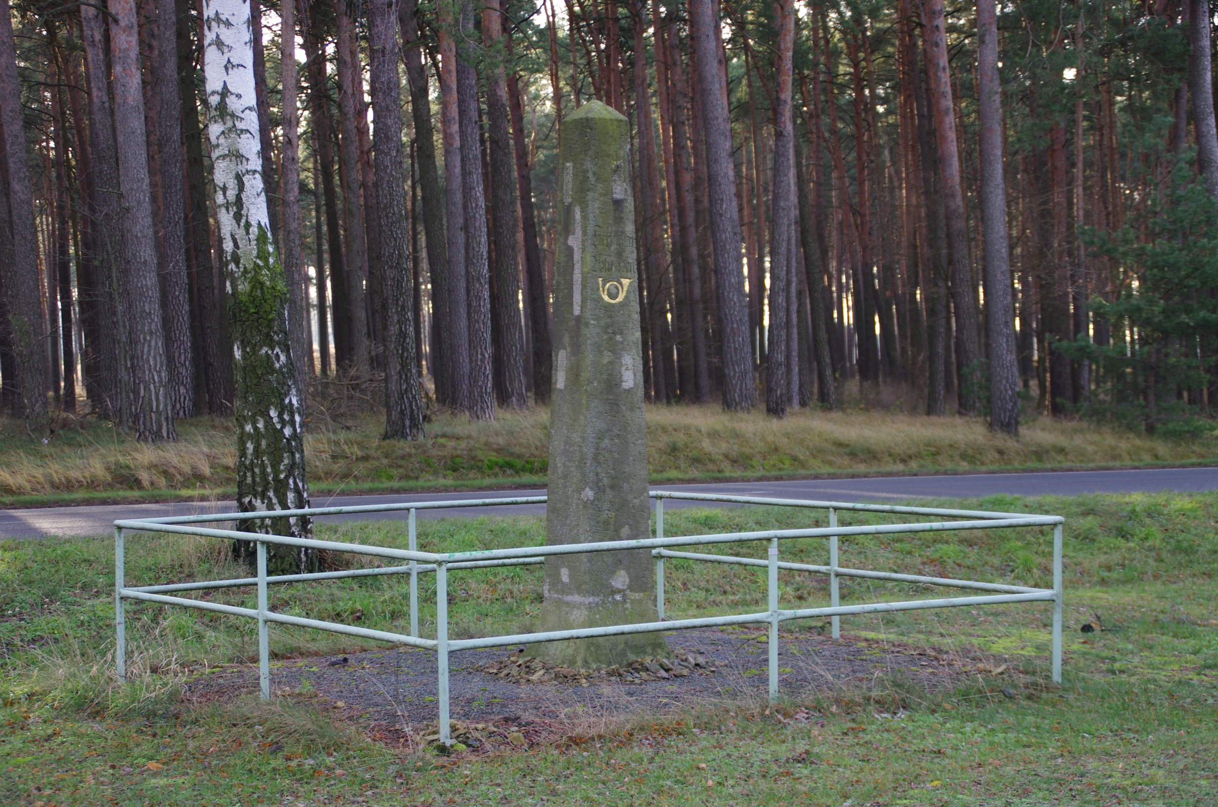 Hohenbucko in Brandenburg. Die Postmailensäule steht an der Schliebener Straße am südlichen Ortsausgang.